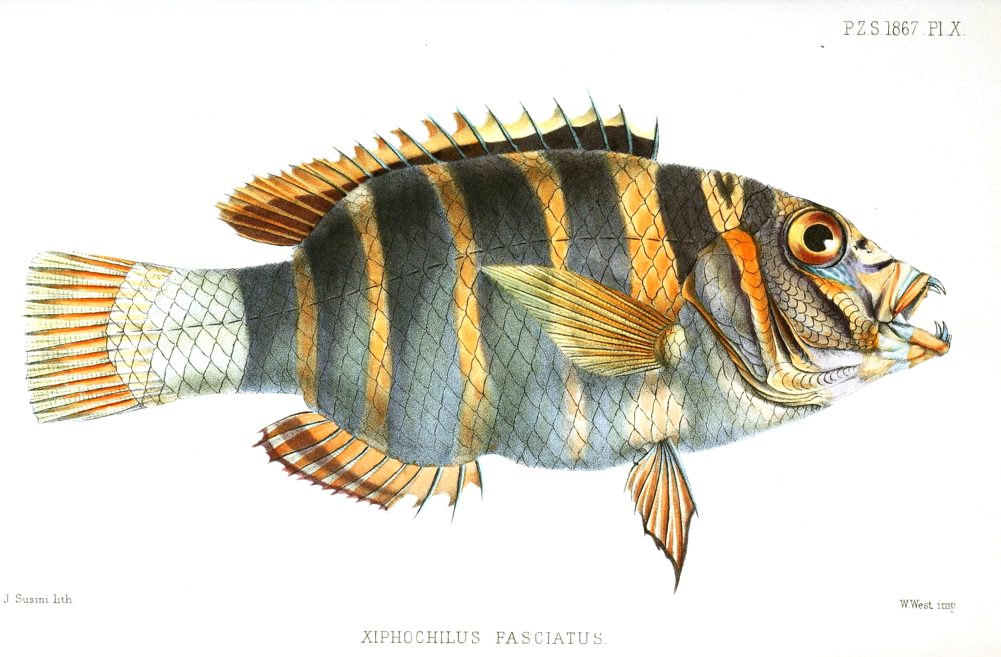 Xiphochilus fasciatus=Choerodon fasciatus